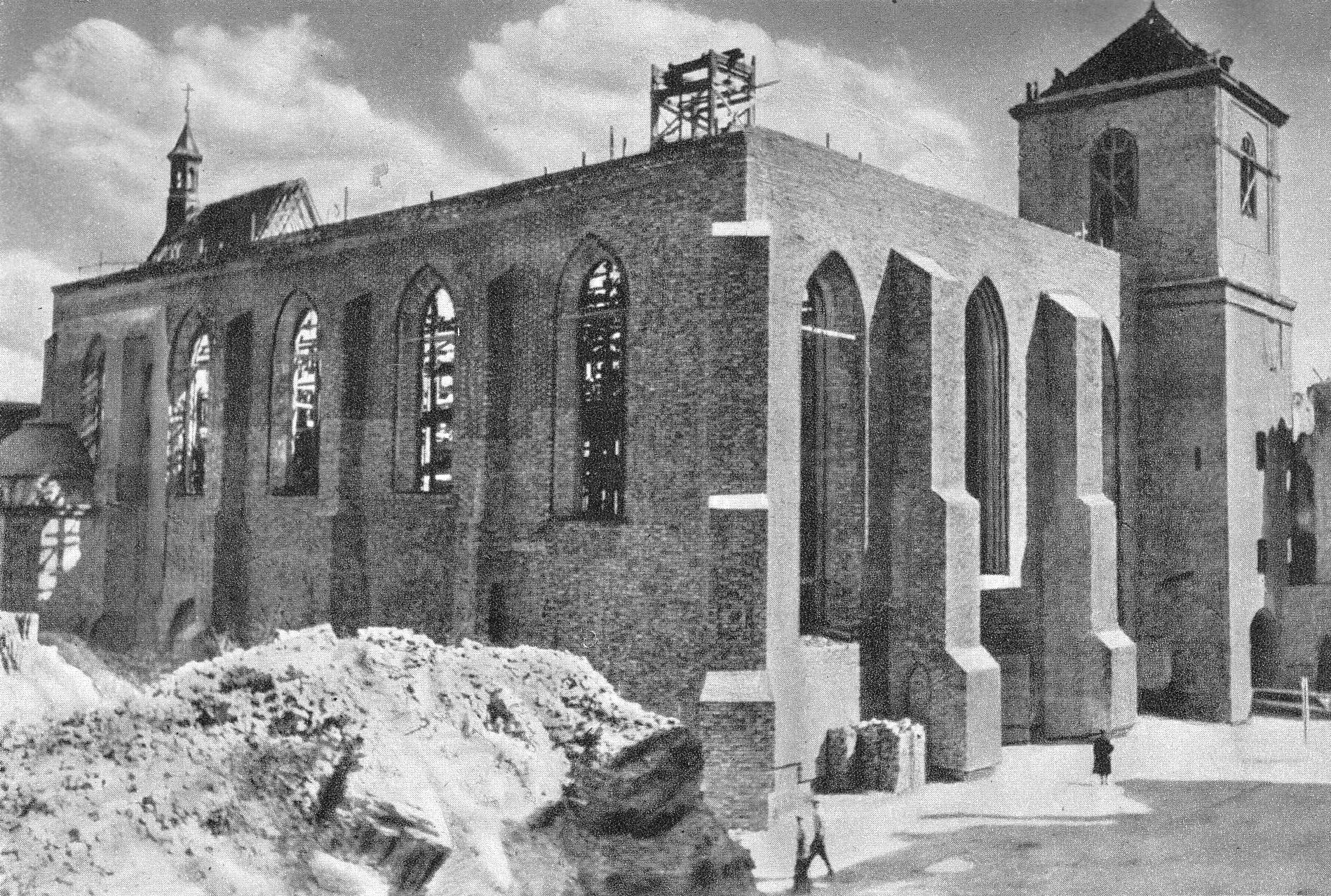 Odbudowa katedry św. Jana w Warszawie